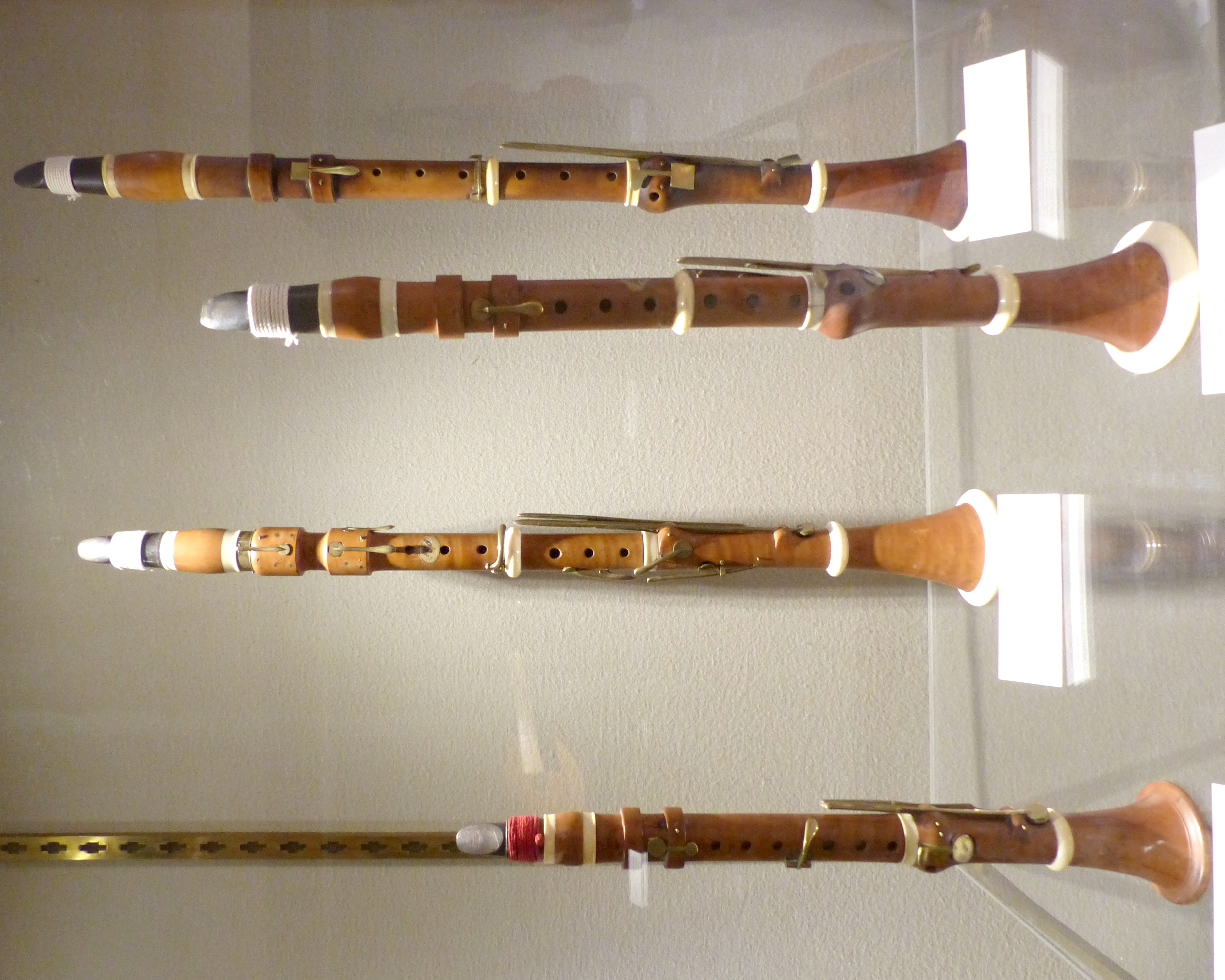 Nice (Alpes-Maritimes, France), au cœur du Vieux Nice, le palais Lascaris avec, entre autres, sa fabuleuse collection d'instruments de musique anciens, la deuxième de France.